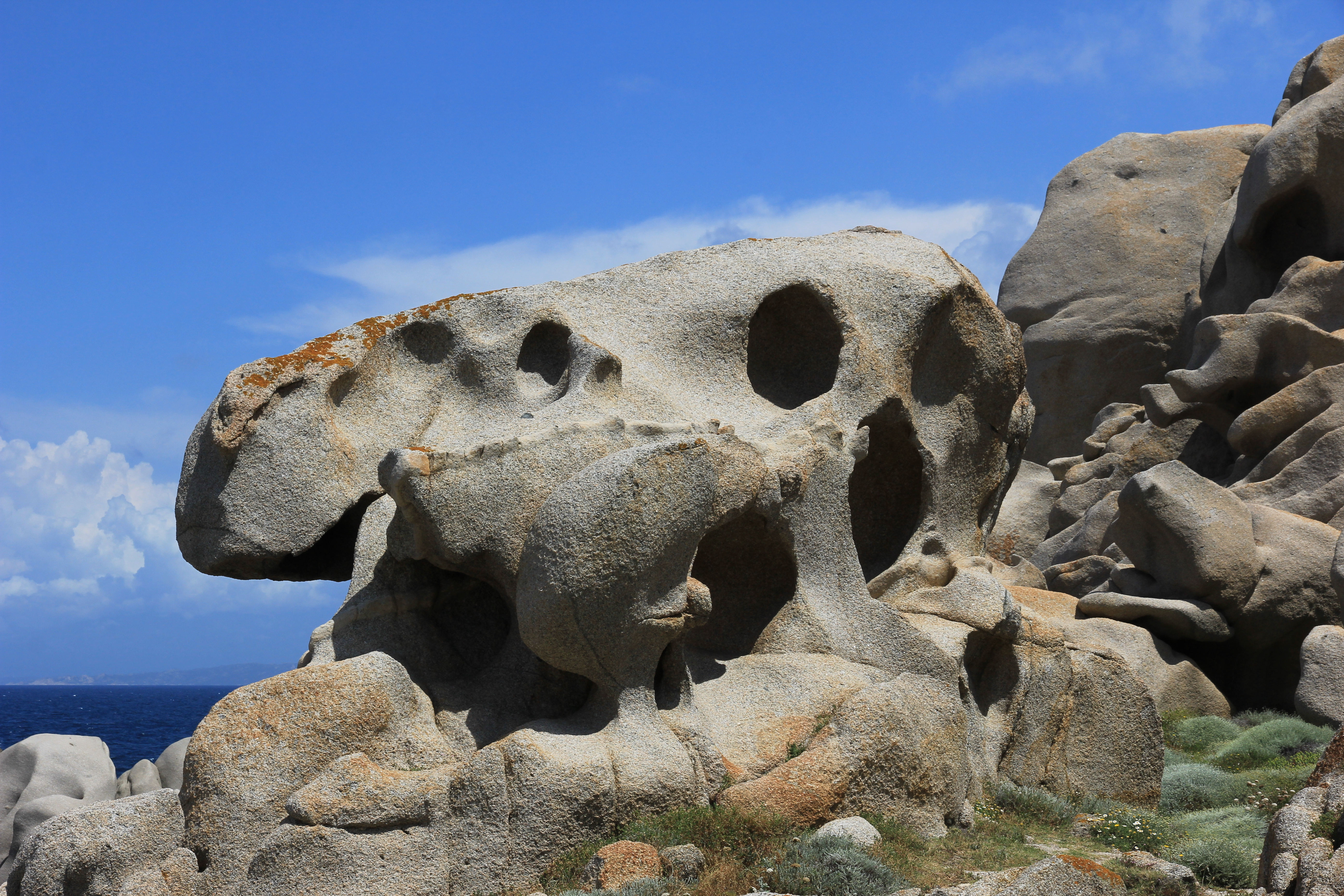 Capo Testa (Santa Teresa Gallura)